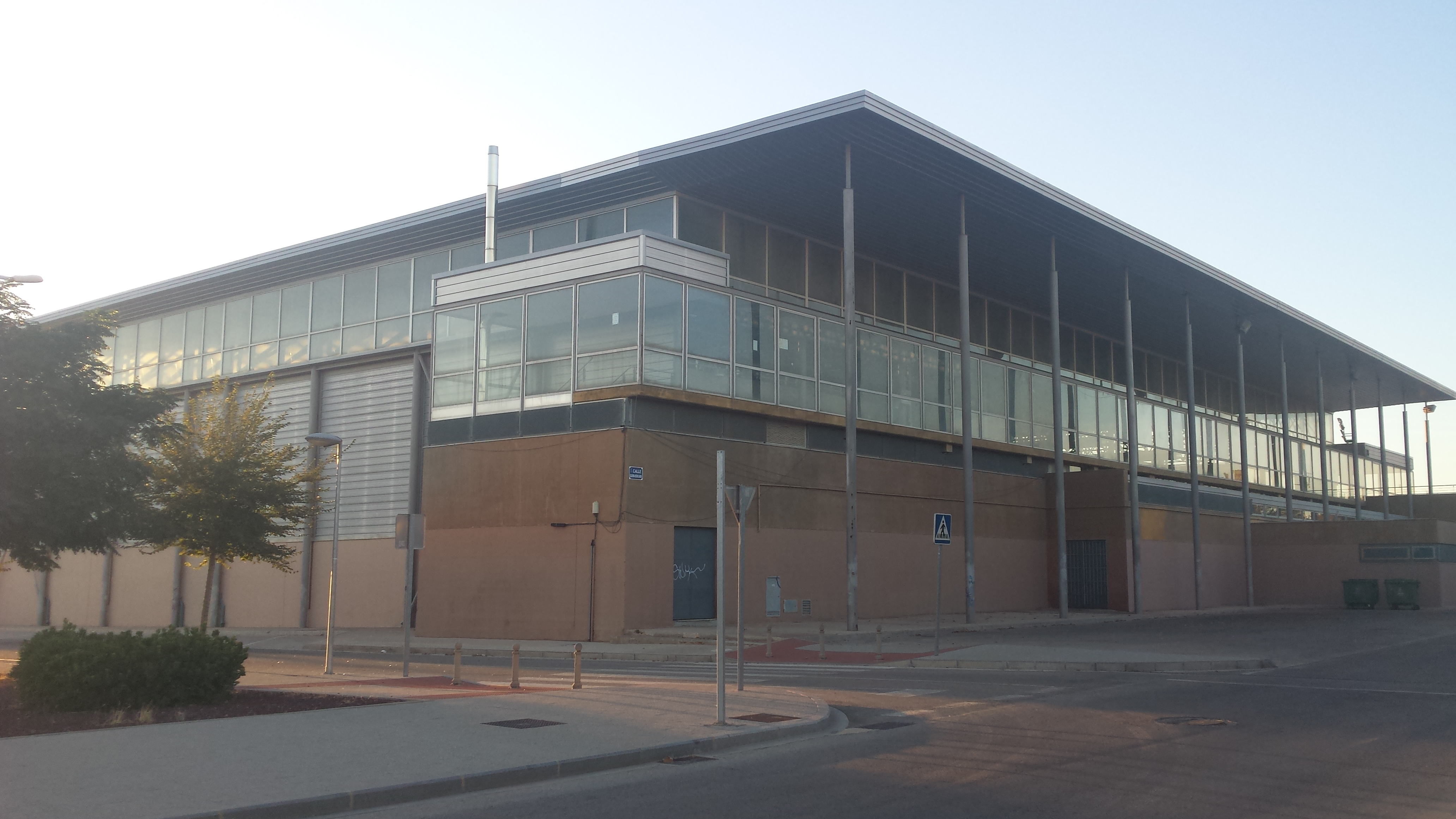 Pabellón Universitario de Albacete. Barrio Universidad. Albacete